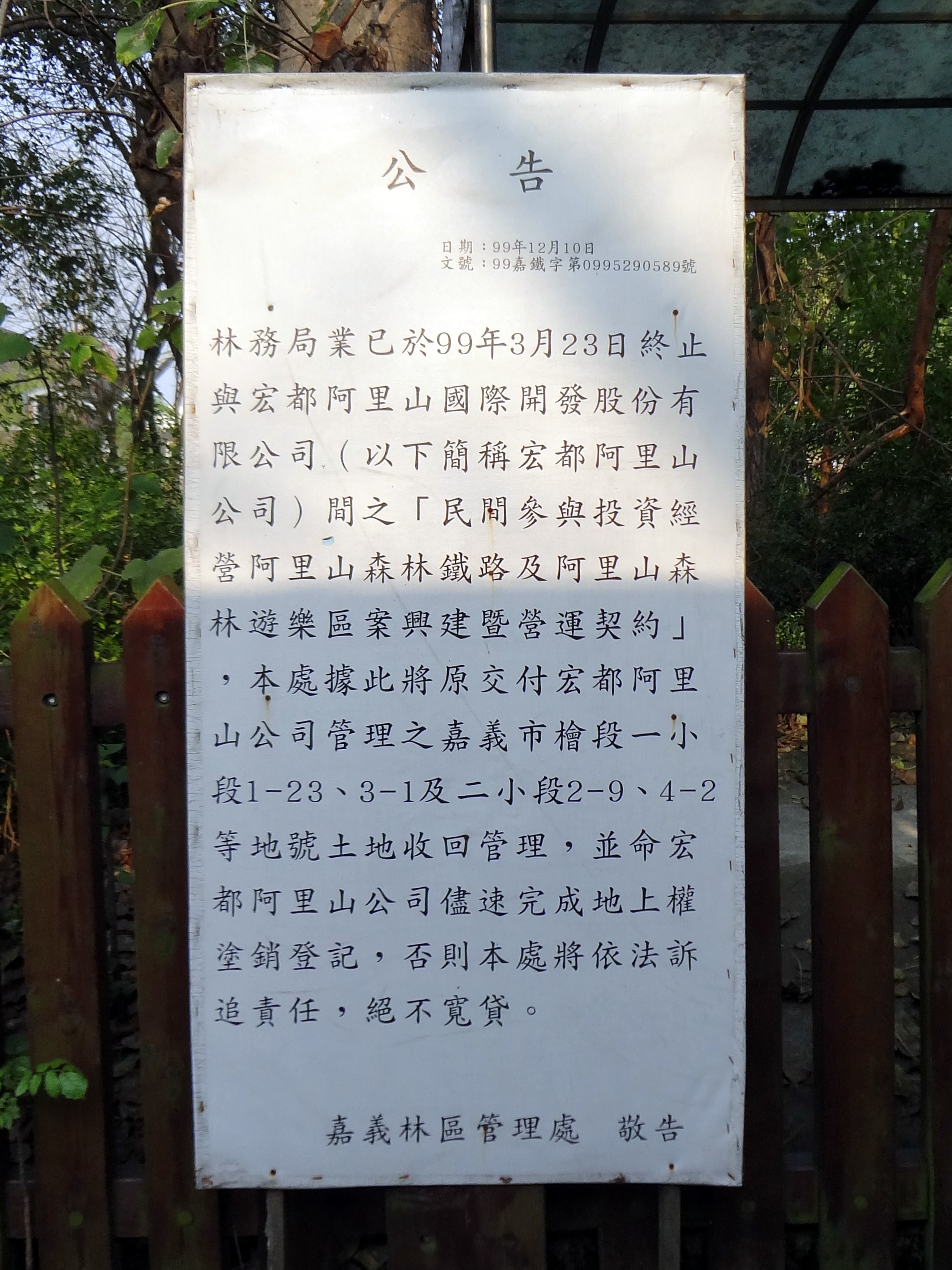 嘉義市東區忠孝路阿里山麗星北門大飯店外，行政院農業委員會林務局嘉義林區管理處豎立的公告牌，公告將原交付宏都阿里山公司管理之阿里山麗星北門大飯店土地收回管理。